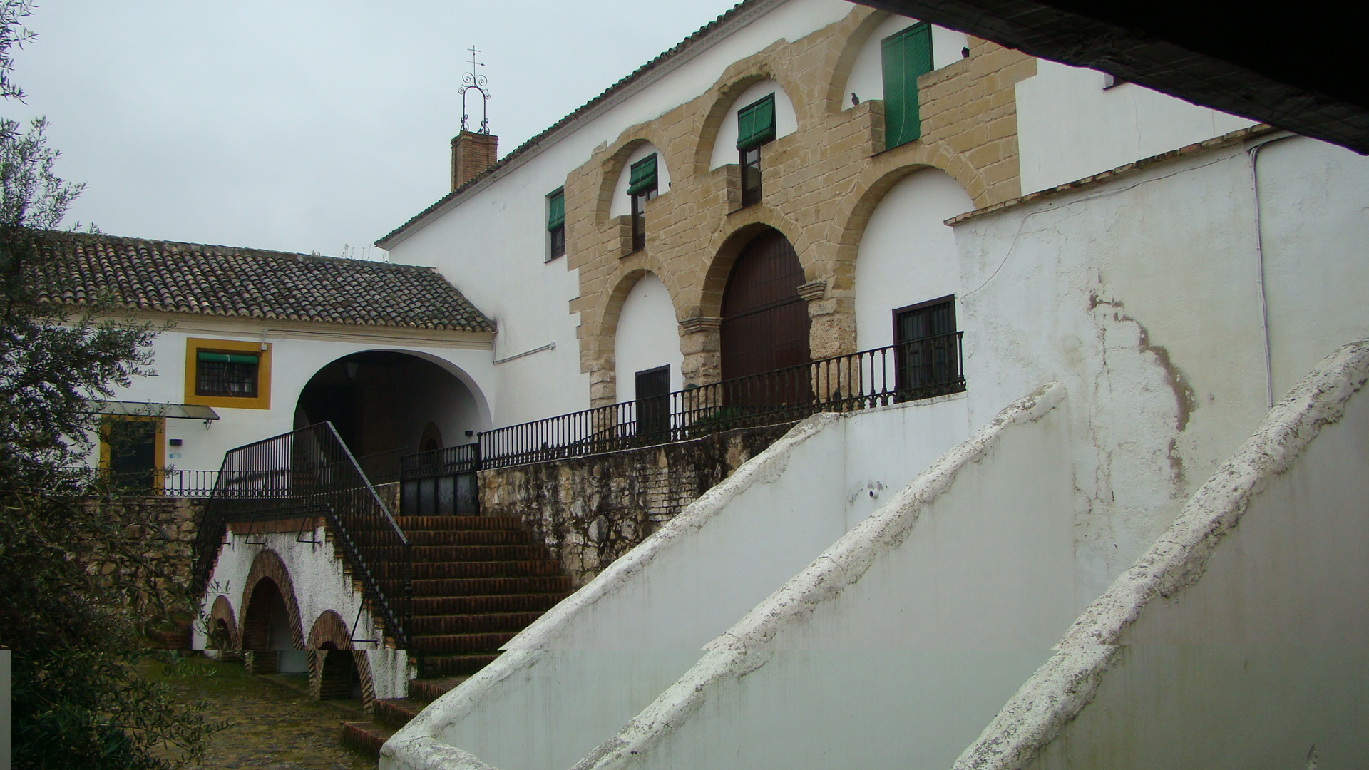 bodega de Aceite de la Hacienda de la Laguna (Baeza)